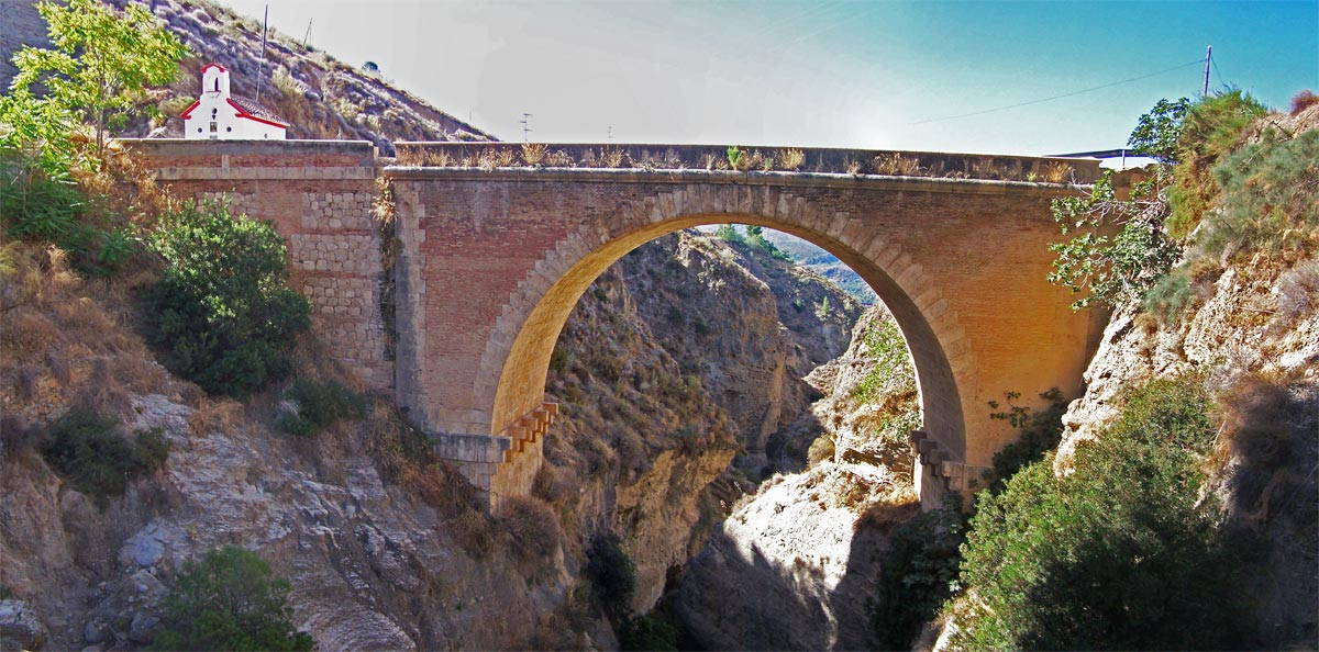 Vista del puente de Tablate nuevo, construido hacia 1850, por su lado norte